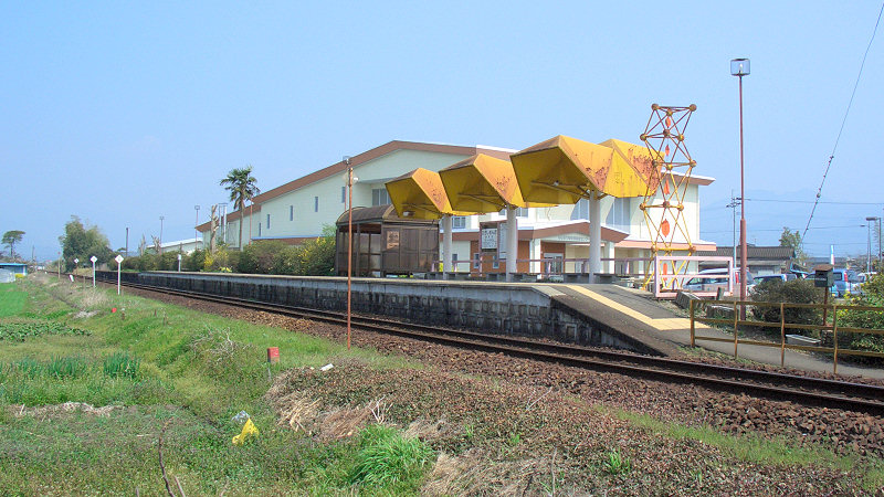 くま川鉄道湯前線ja:東免田駅 ホーム 写真右側がja:人吉駅方面。 撮影者/著者/著作権保有者 : MK Products (本人がアップロード) 撮影日 : 2007/03/22 東免田駅用にアップロードした画像です。良い画像があれば別の画像に変えてください。